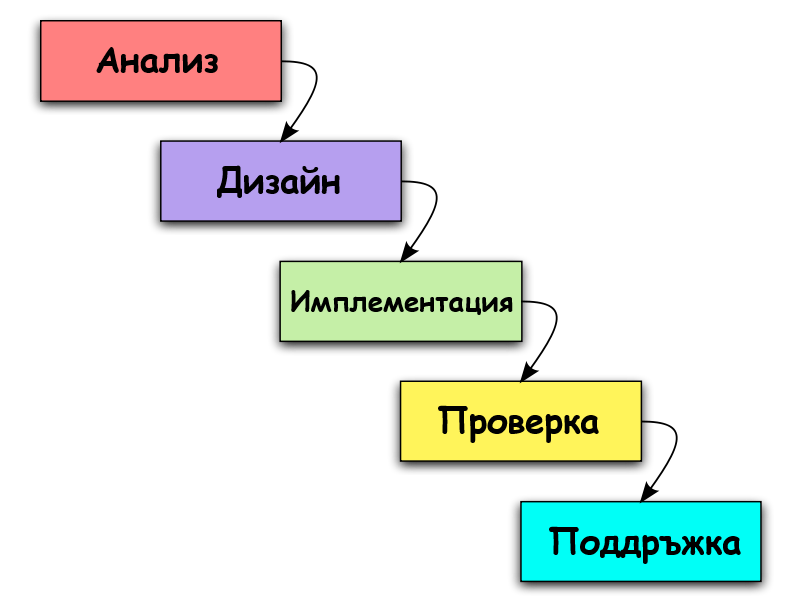 Немодифицирания "водопаден модел". Процеса тече отгоре надолу като каскаден водопад.